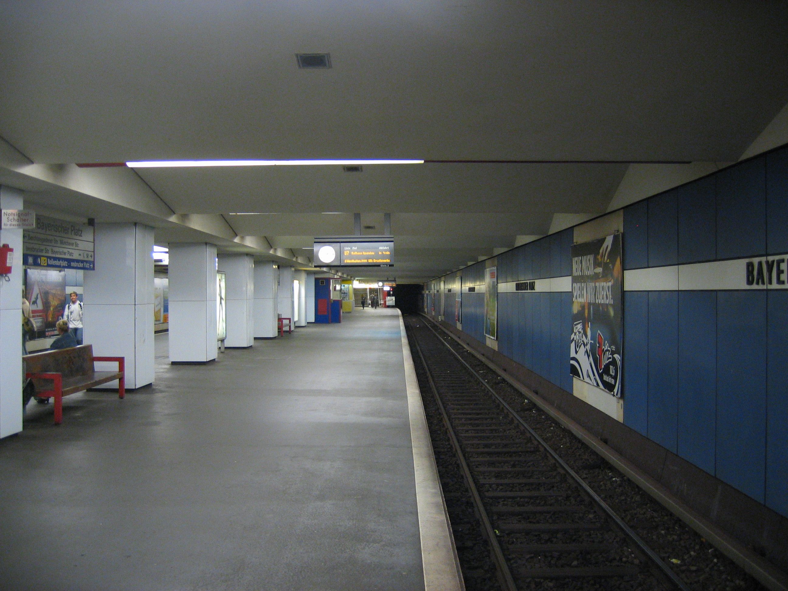 U-Bahnhof Bayerischer Platz, Berlin